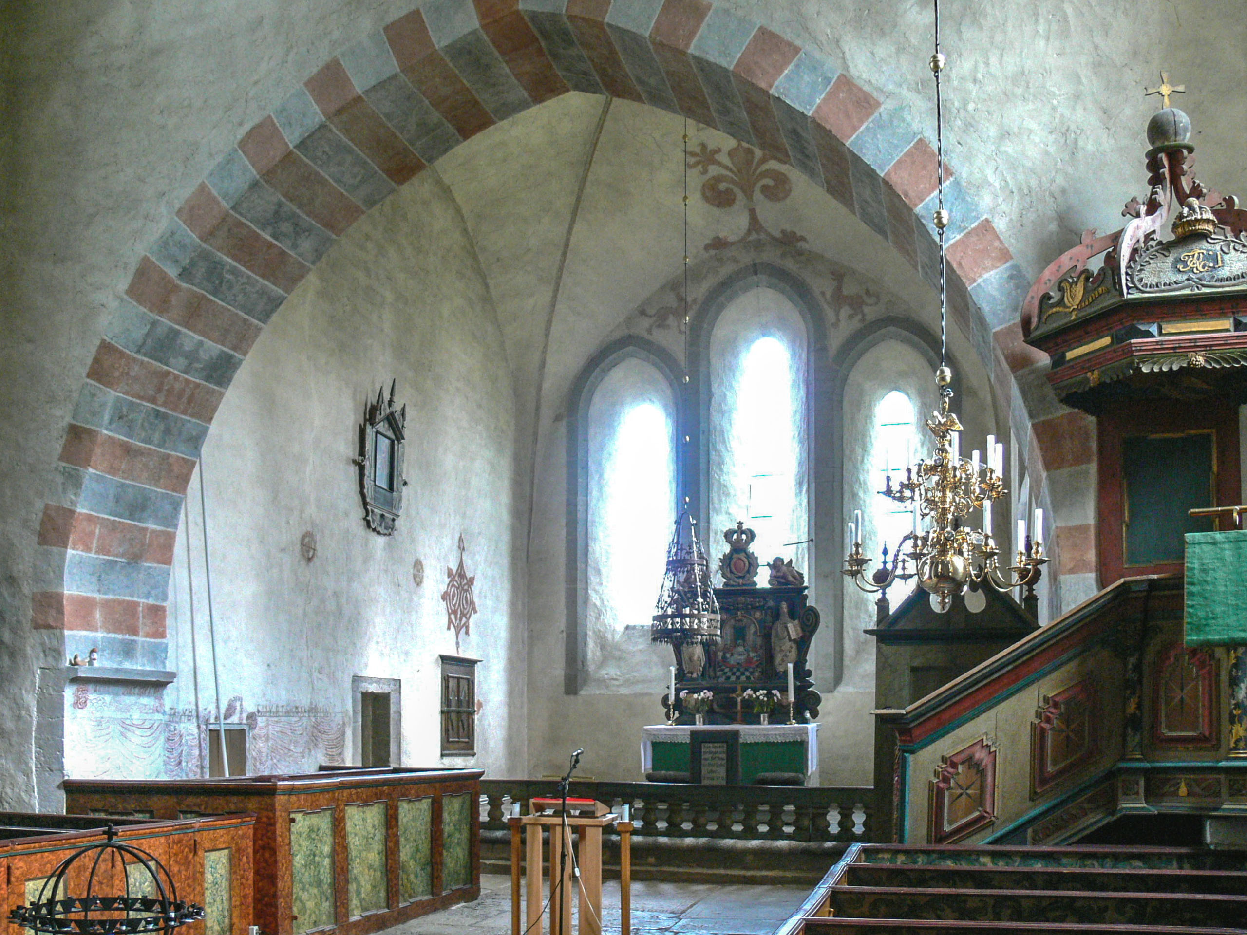 Boge kyrka auf Gotland. Chorraum